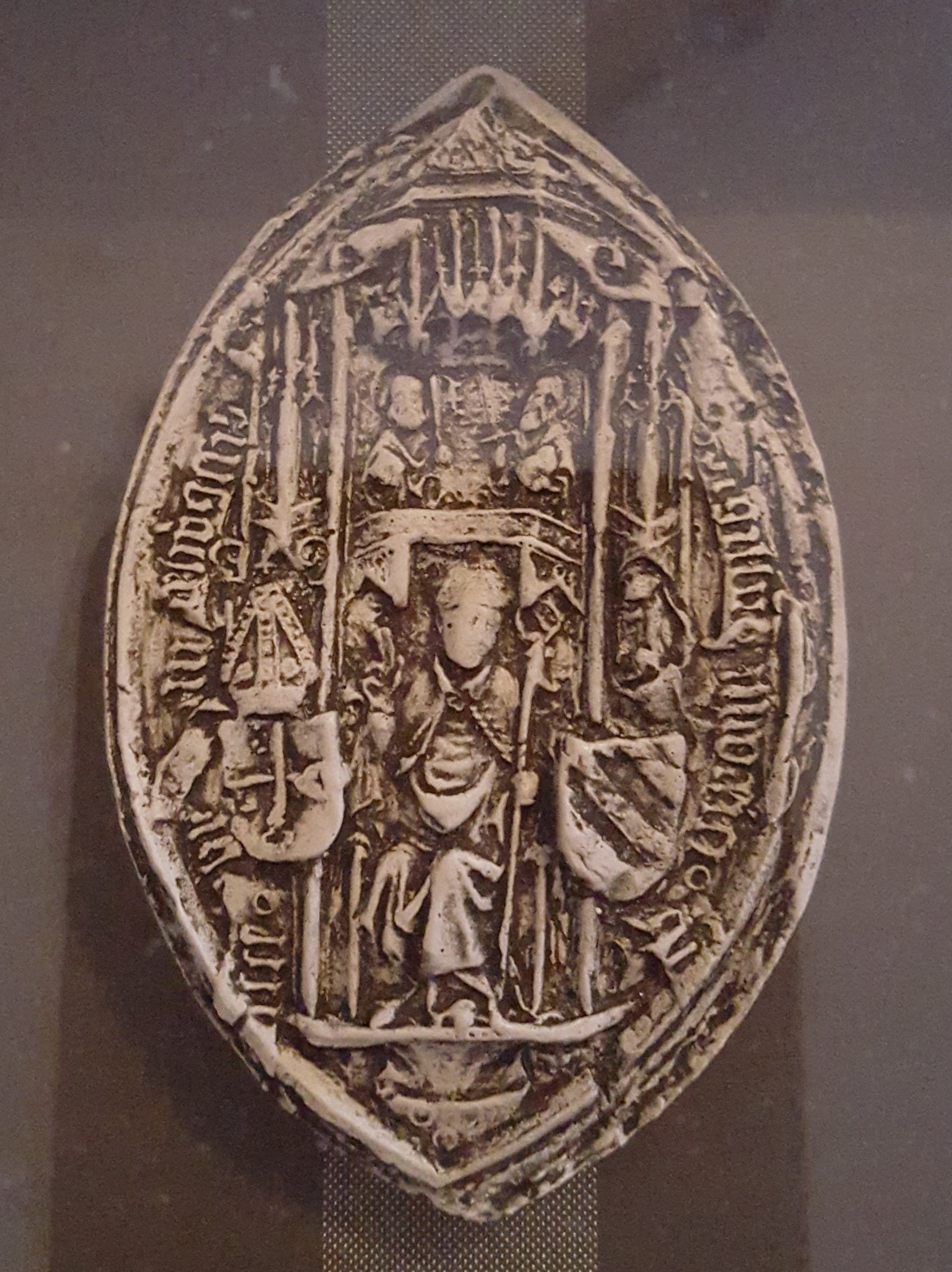 Siegel des Brandenburger Bischofs Dietrich von Stechow, Museum für brandenburgische Kirchen- und Kulturgeschichte des Mittelalters in Ziesar